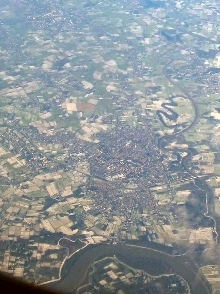 Hamme (Oost-Vlaanderen), gezien naar het Westen. Januari 2015